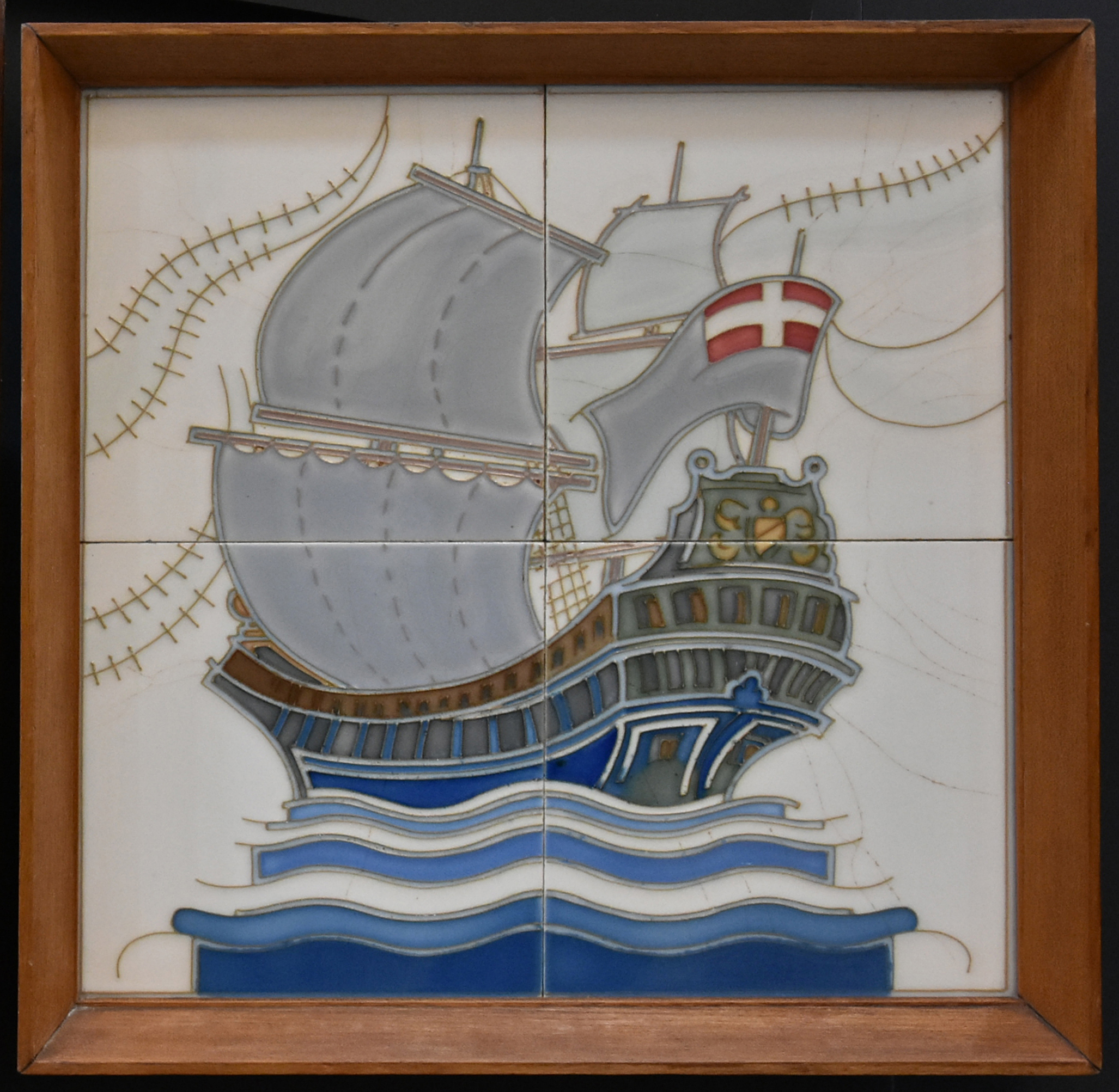 Roberto Pozzocollectie ontwerp Joseph Roelants Gilliot & Roelants tegelmuseum Hemiksem 27-07-2019 This photo of immovable heritage has been taken in the Flemish Region